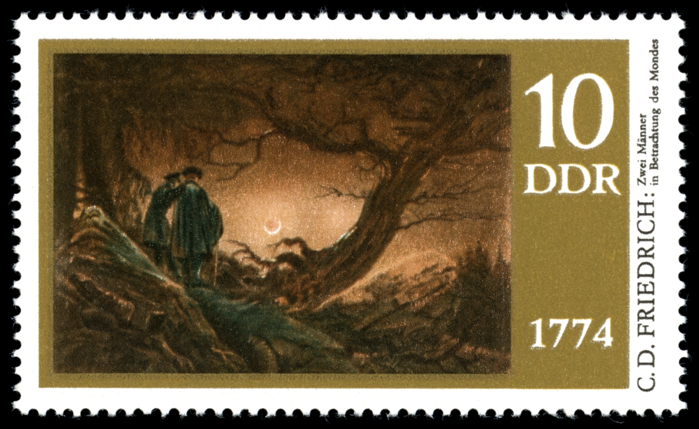 Information: 200. Geburtstag von Caspar David Friedrich: Zwei Männer in Betrachtung des Mondes Ausgabepreis: 10 Pfennig First Day of Issue / Erstausgabetag: 21. Mai 1974 Auflage: 15.000.000 Entwurf: Naumann Druckverfahren: Rastertiefdruck Michel-Katalog-Nr: Ländercode-MiNr: 1958